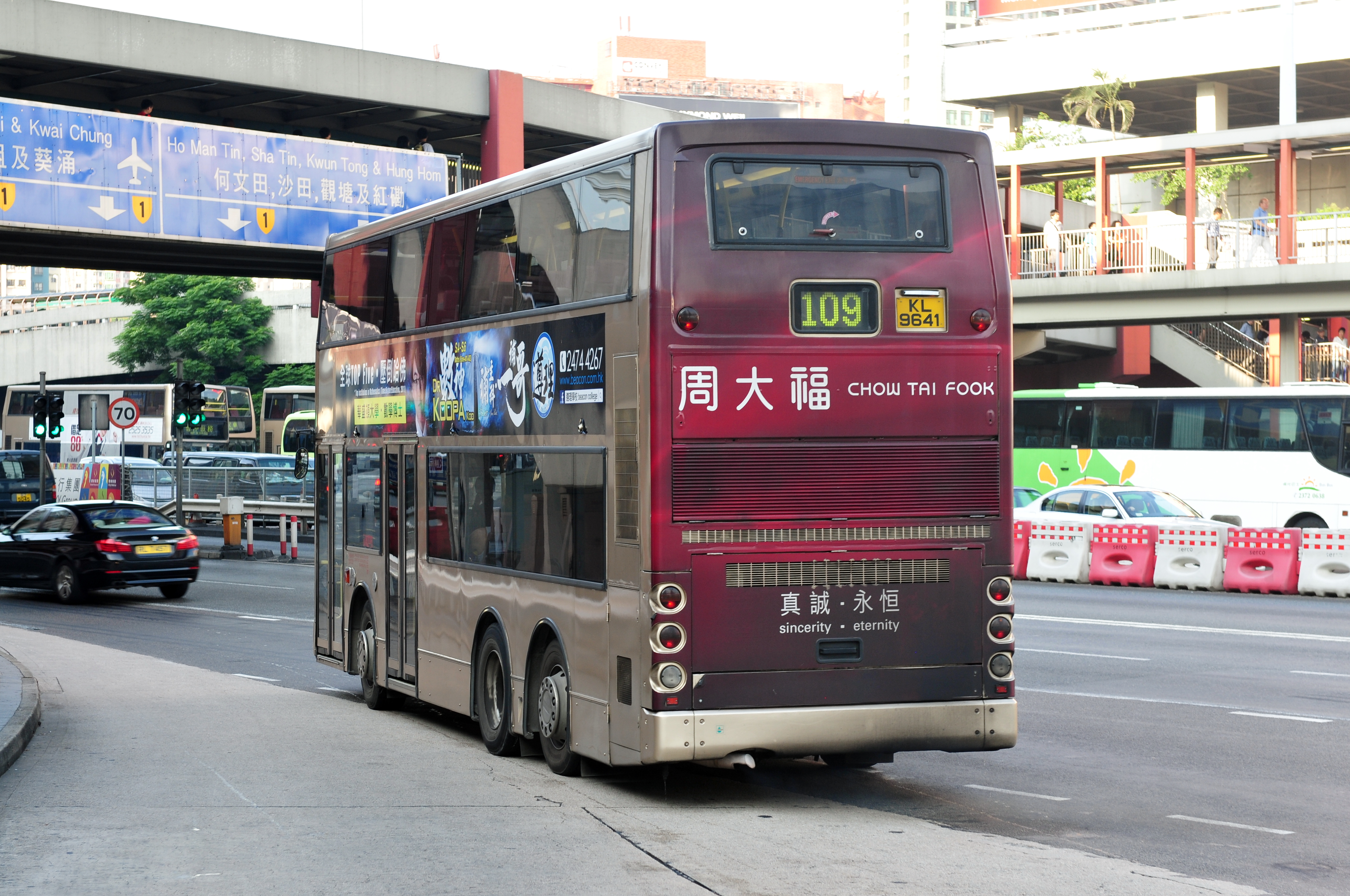 Wikimania 2013 Hongkong